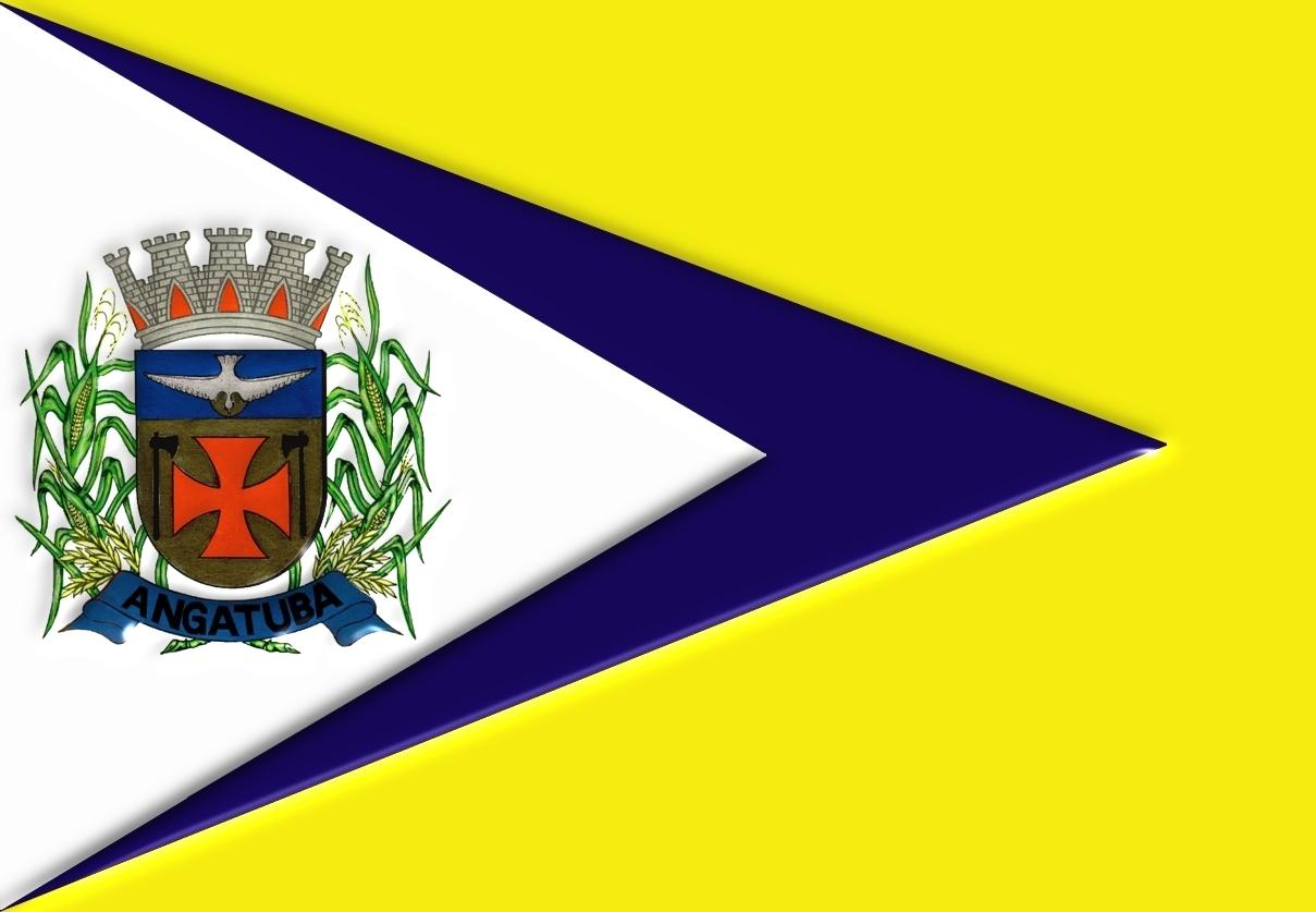 Bandeira Oficial da Cidade de Angatuba